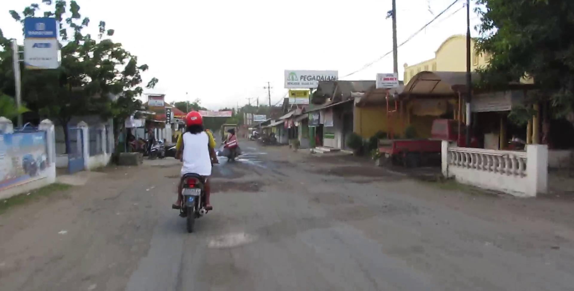 mainstreet Cijulang in 2013